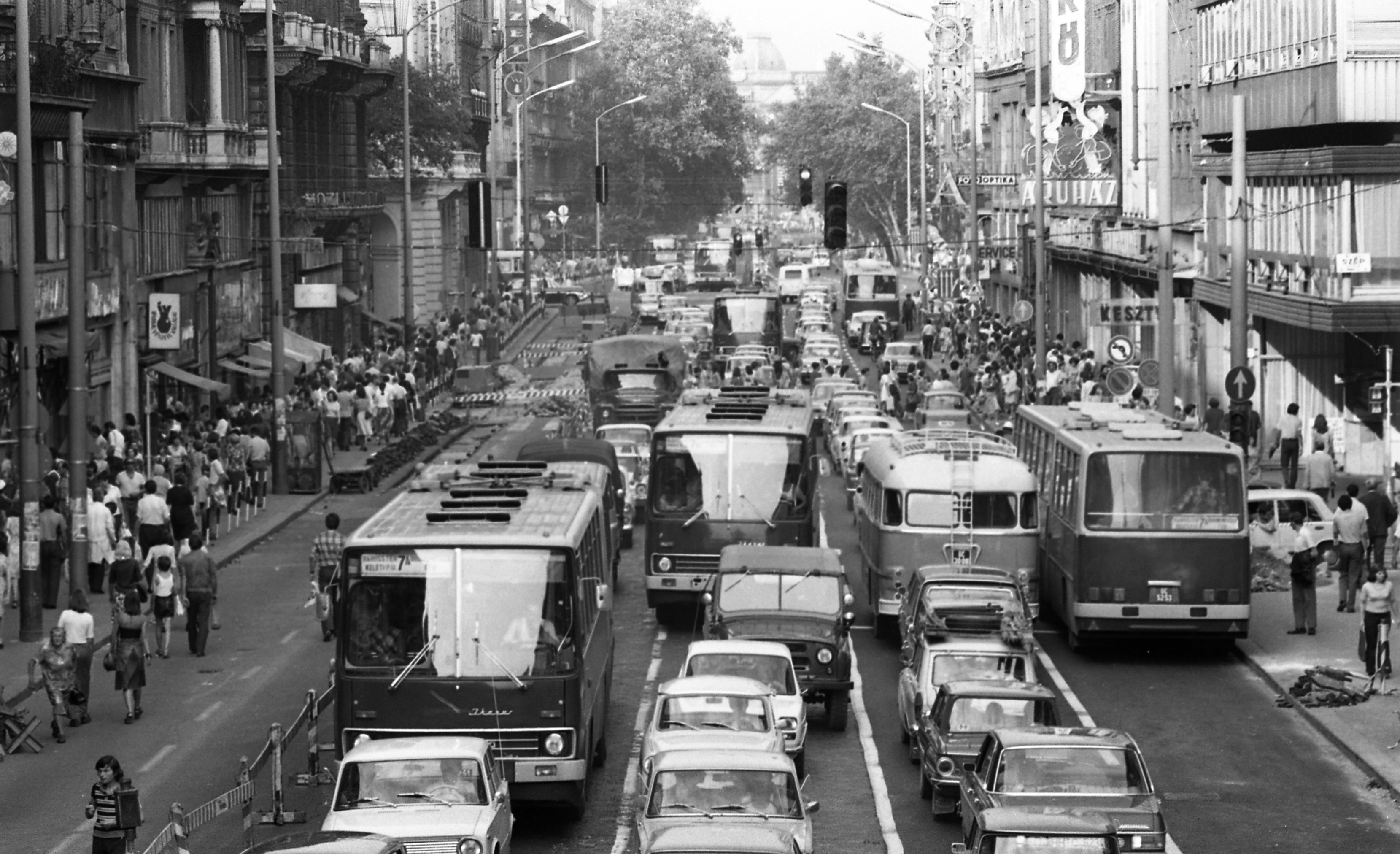 Kossuth Lajos utca az Astoria kereszteződés felé nézve. Location: Hungary, Budapest V. Tags: Hungarian brand, automobile, Ikarus-brand, bus, Budapest, street view, traffic, neon sign Title: Kossuth Lajos utca az Astoria kereszteződés felé nézve.